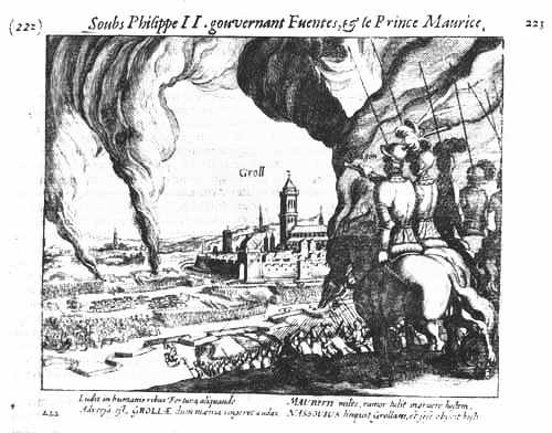 Vergeefse aanval van Maurits op Groenlo - 1595. De Spaanse kolonel Christoffel Mondragon ontzet Groenlo. Historieprent